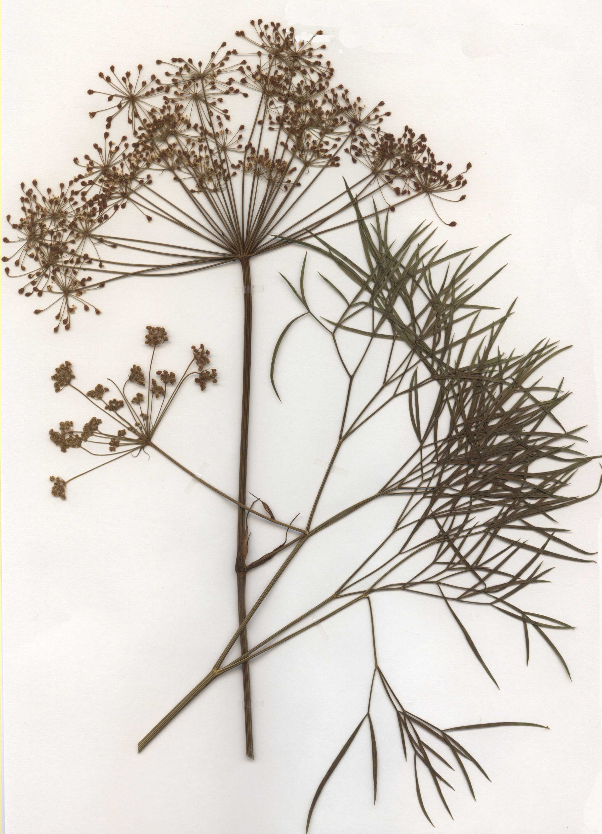 Peucedanum officinale, eigener Herbarbeleg von 1984, Unterfranken (Die Art sollte wegen ihrer Gefährdung und Seltenheit nicht gesammelt werden!)